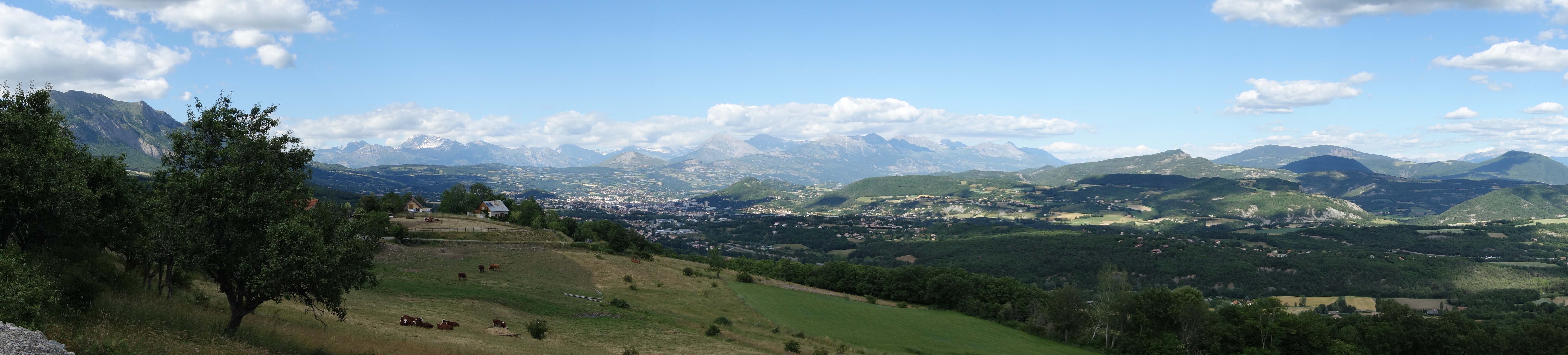 Panoramic view of the region of Gap, France